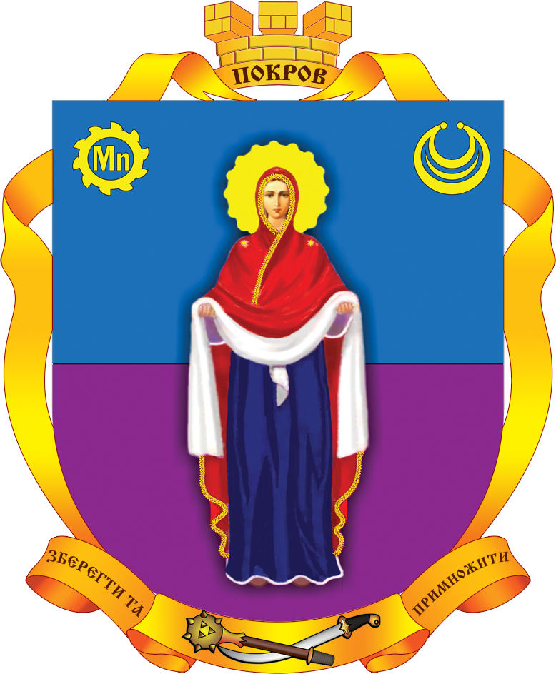 Герб міста Покров